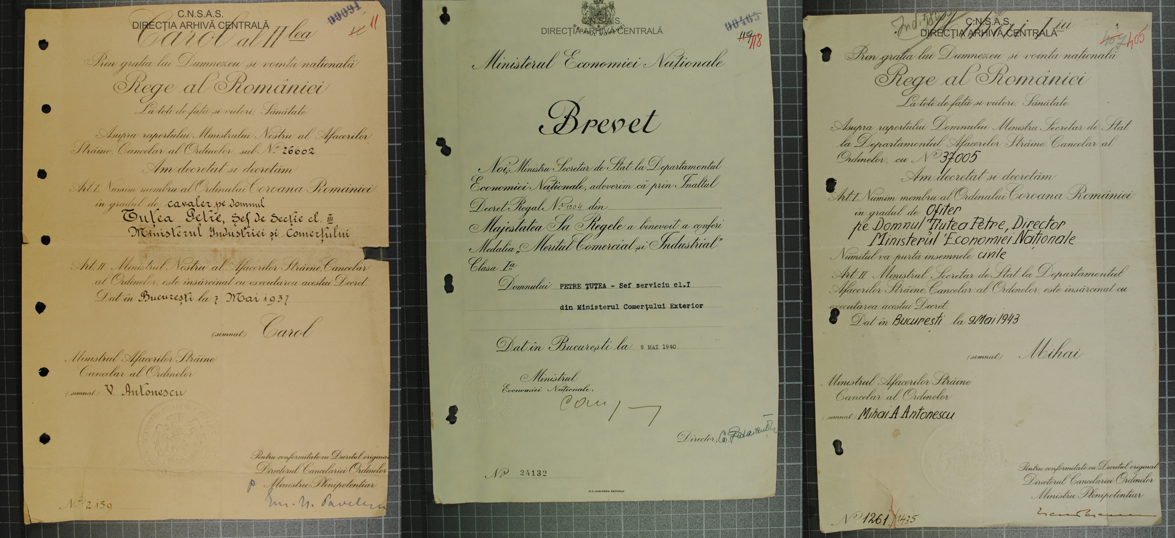 Brevetele primite de Petre Țuțea din arhiva CNSAS